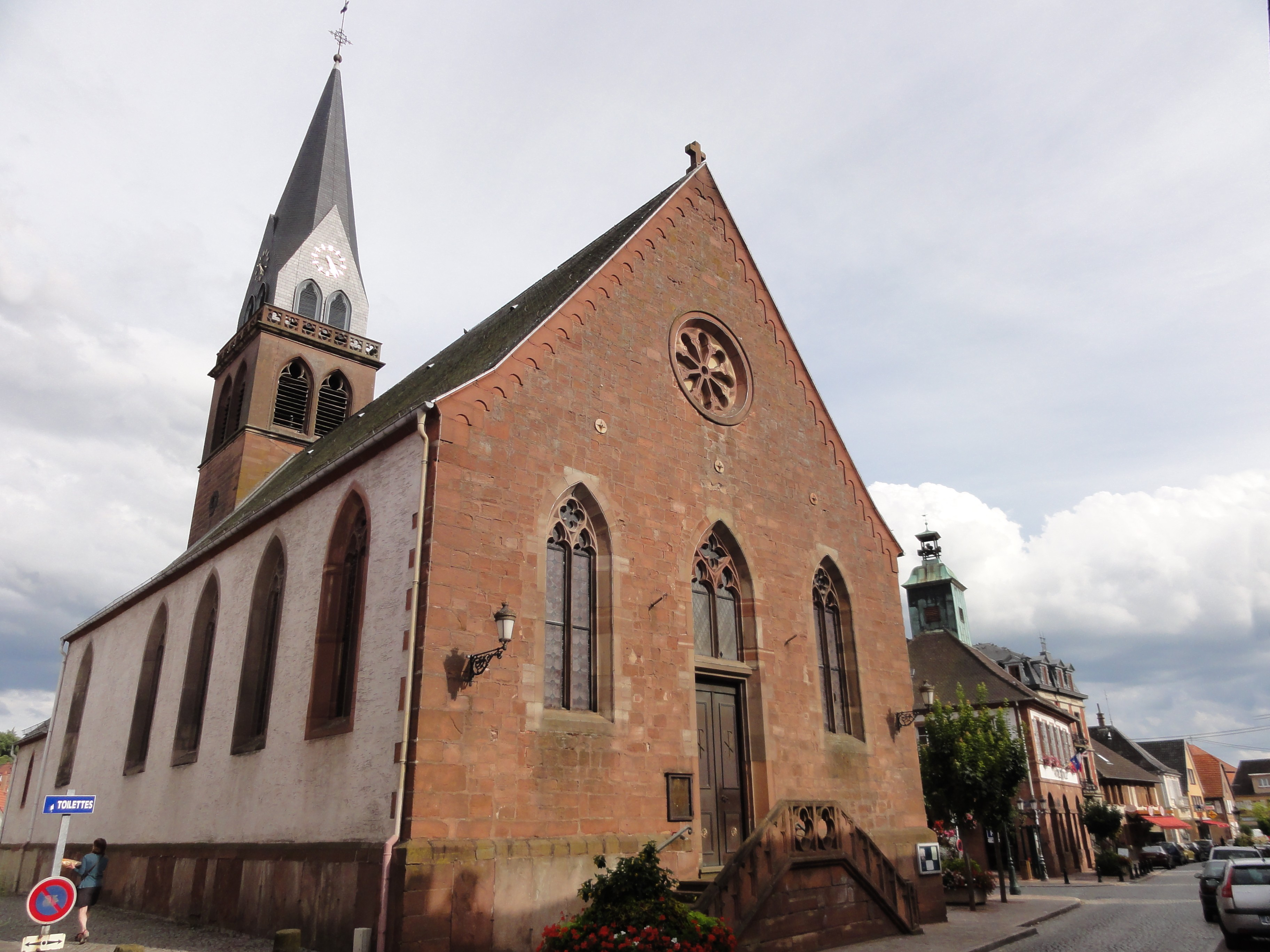 Alsace, Bas-Rhin, Église protestante d'Ingwiller (IA67009757).